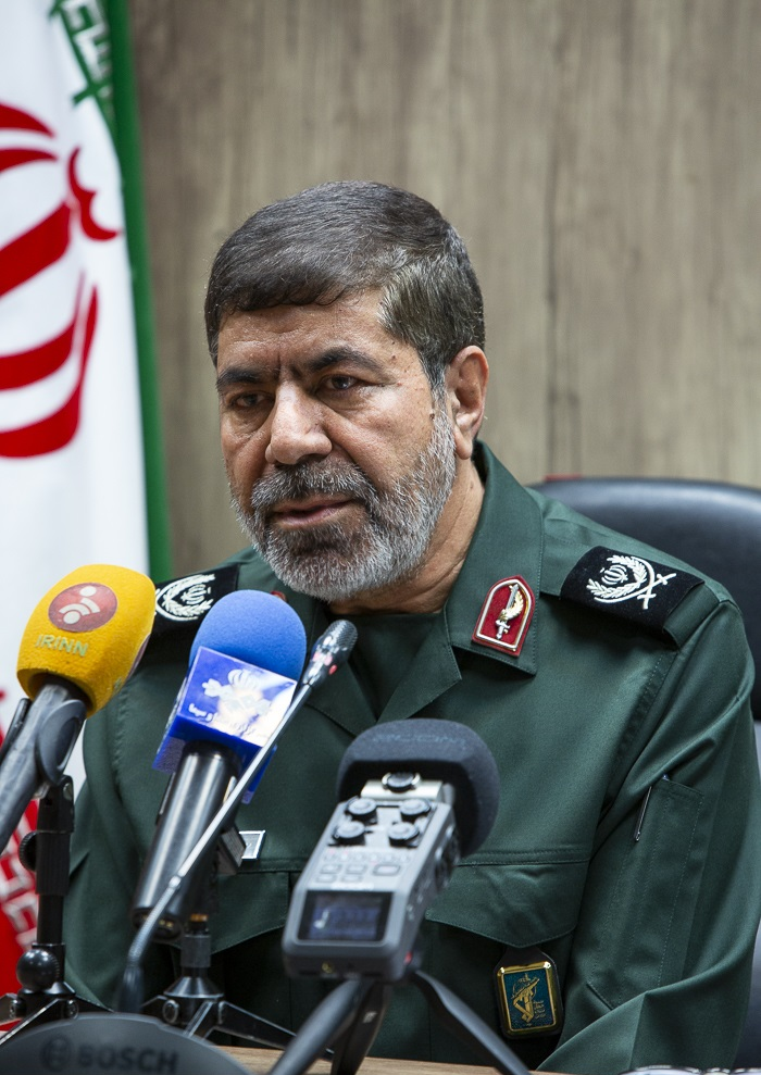 رمضان شریف